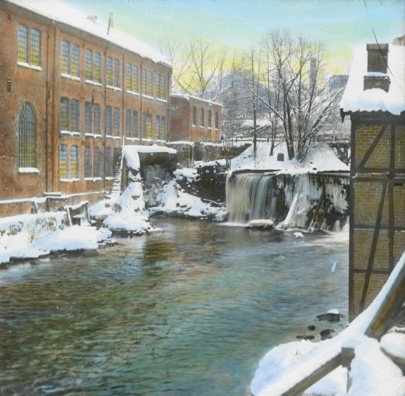 Akerselven ved Bentse Bruk, håndkolorert dias fra 1900